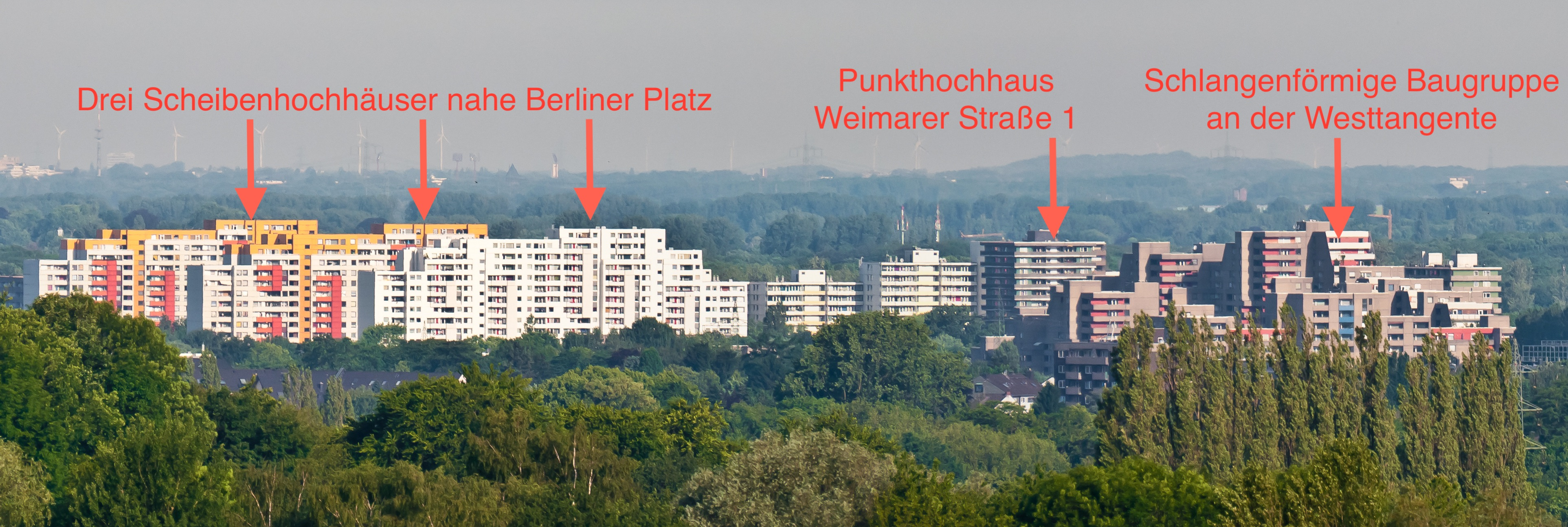 Ratingen-West vom Hasselbecker Berg - Ausschnitt